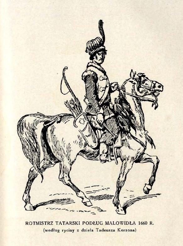 Rotmistrz tatarski